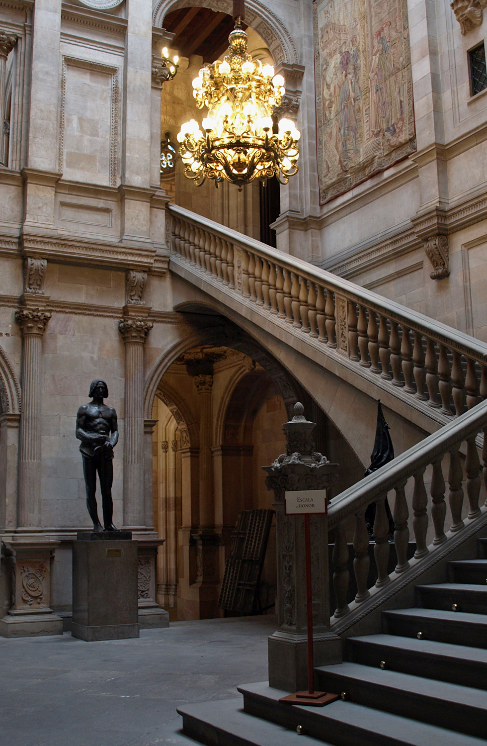 Escala d'honor (Ajuntament de Barcelona)